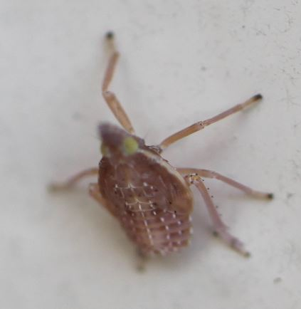 Nymphe des Europäischen Laternenträgers (Dictyophara europaea) am 1. Juli 2018 an der Côte d’Azur